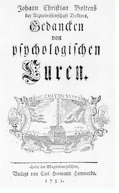 Titelblatt des Buches von Bolten, Johann Christian (1751). Gedancken von psychologischen Kuren. Halle: Hemmerde.